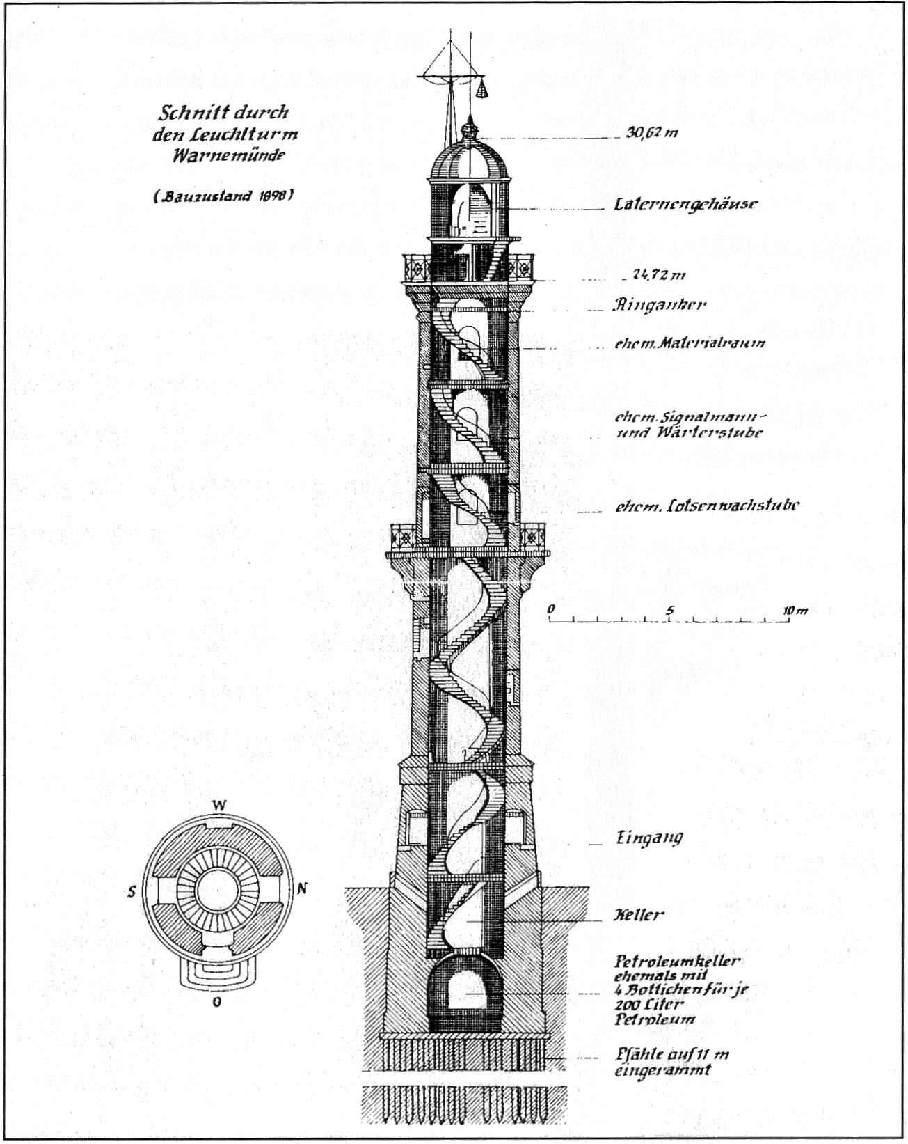 Leuchtturm Rostock-Warnemünde / Lighthouse Rostock-Warnemünde